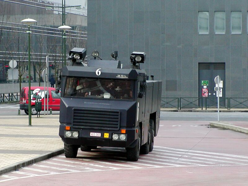 waterkanon MOL van de Federale Politie in Brussel. Eigen foto.